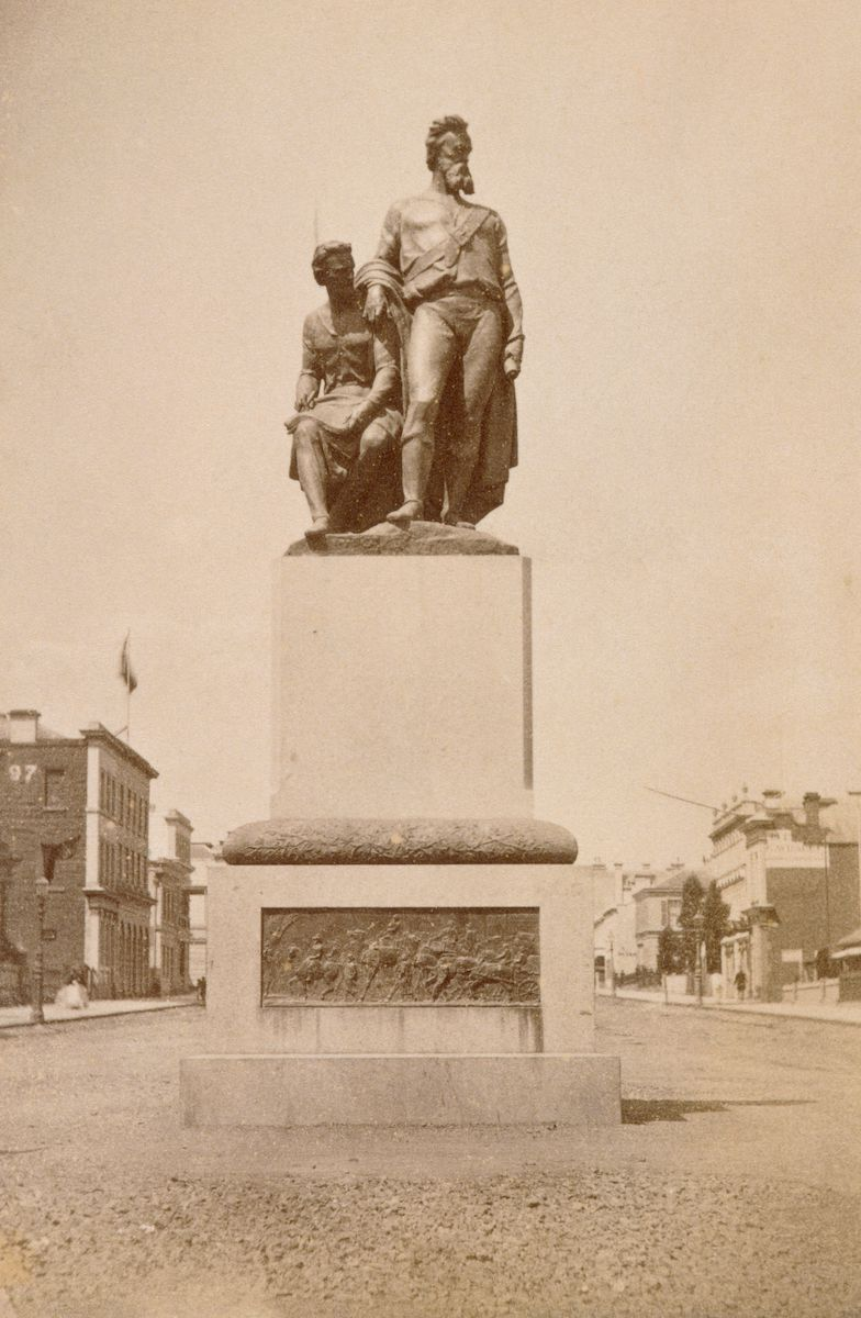 Photographie du monument à Burke et Willis (de l'expédition du même nom). Carte de visite de Thomas Foster Chuck, l'auteur de la photographie en 1869.